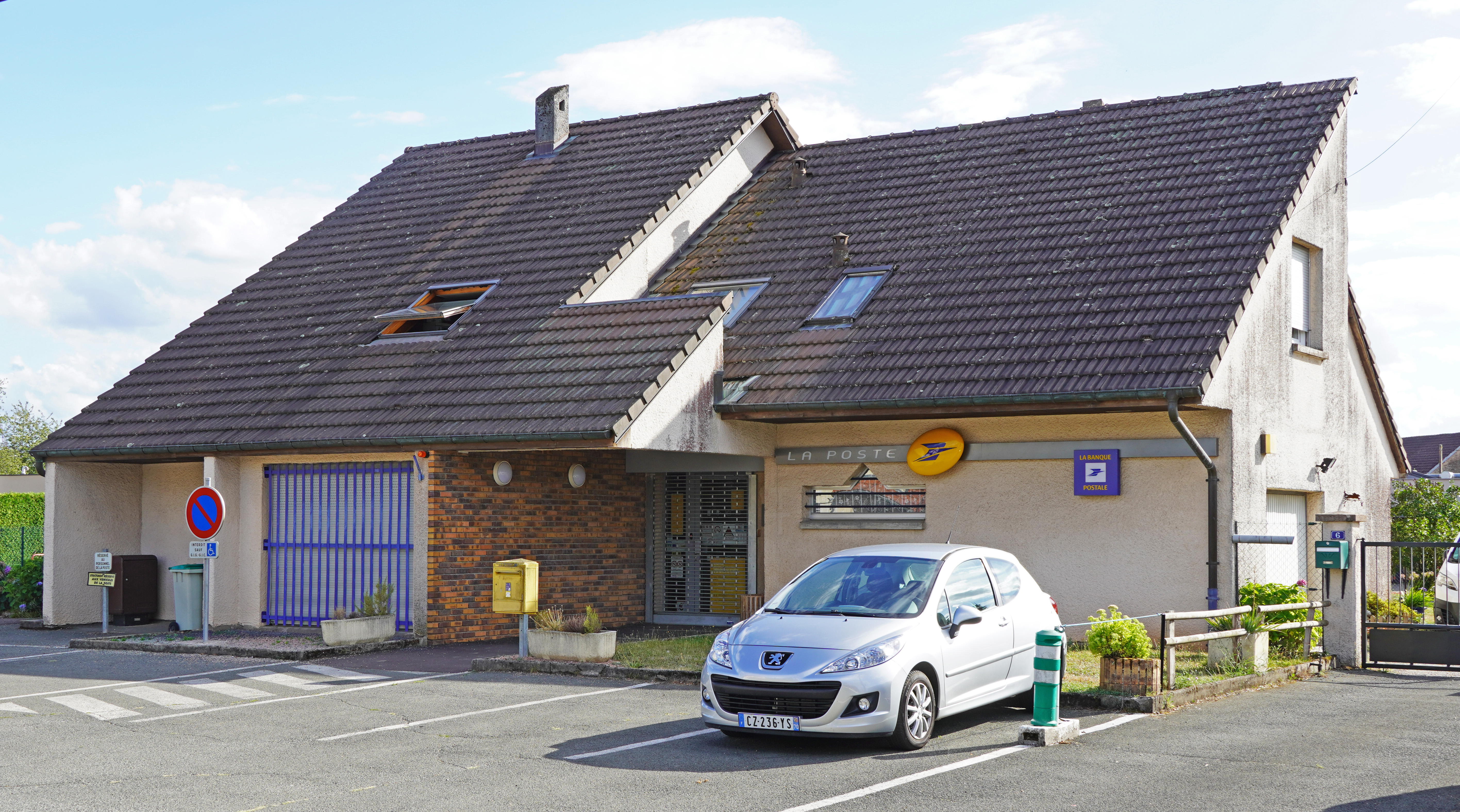 Le bureau de poste de Saint-Germain (Haute-Saône).